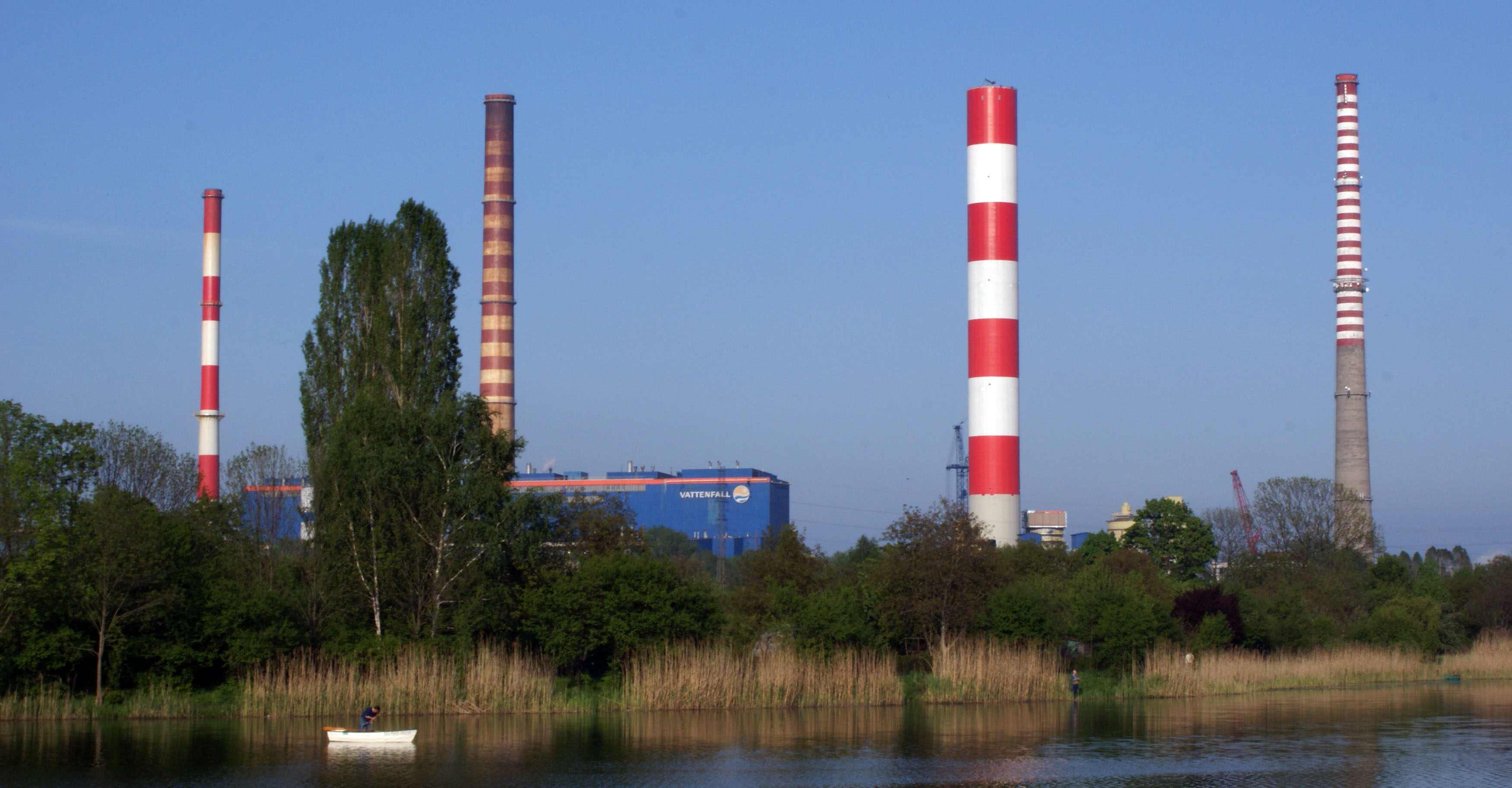 Elektrociepłownia Siekierki, Warszawa; na pierwszym planie fragment Jeziorka Czerniakowskiego